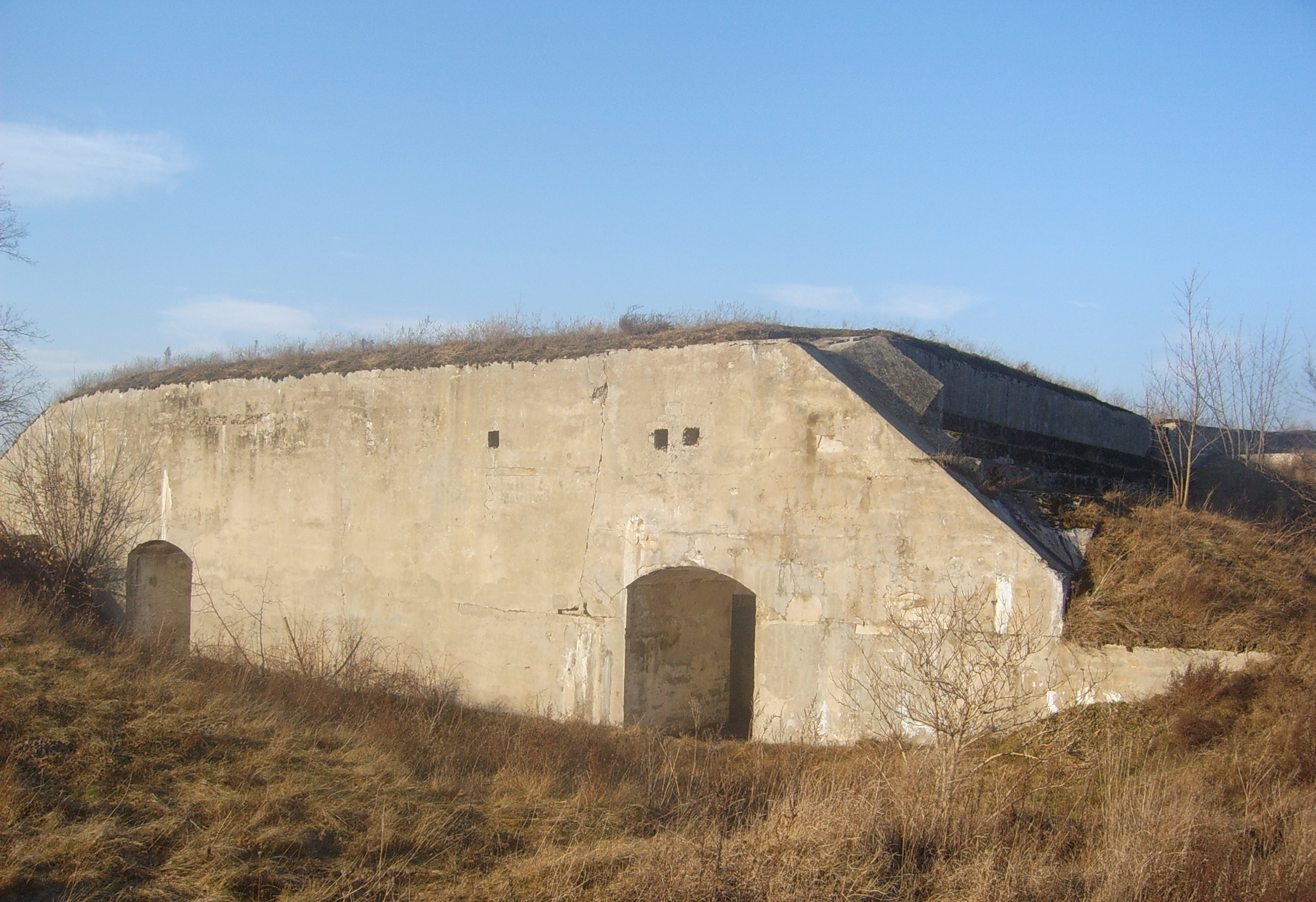 Fort Janowo (Fort XII Twierdzy Modlin) w Janowie (powiat nowodworski)